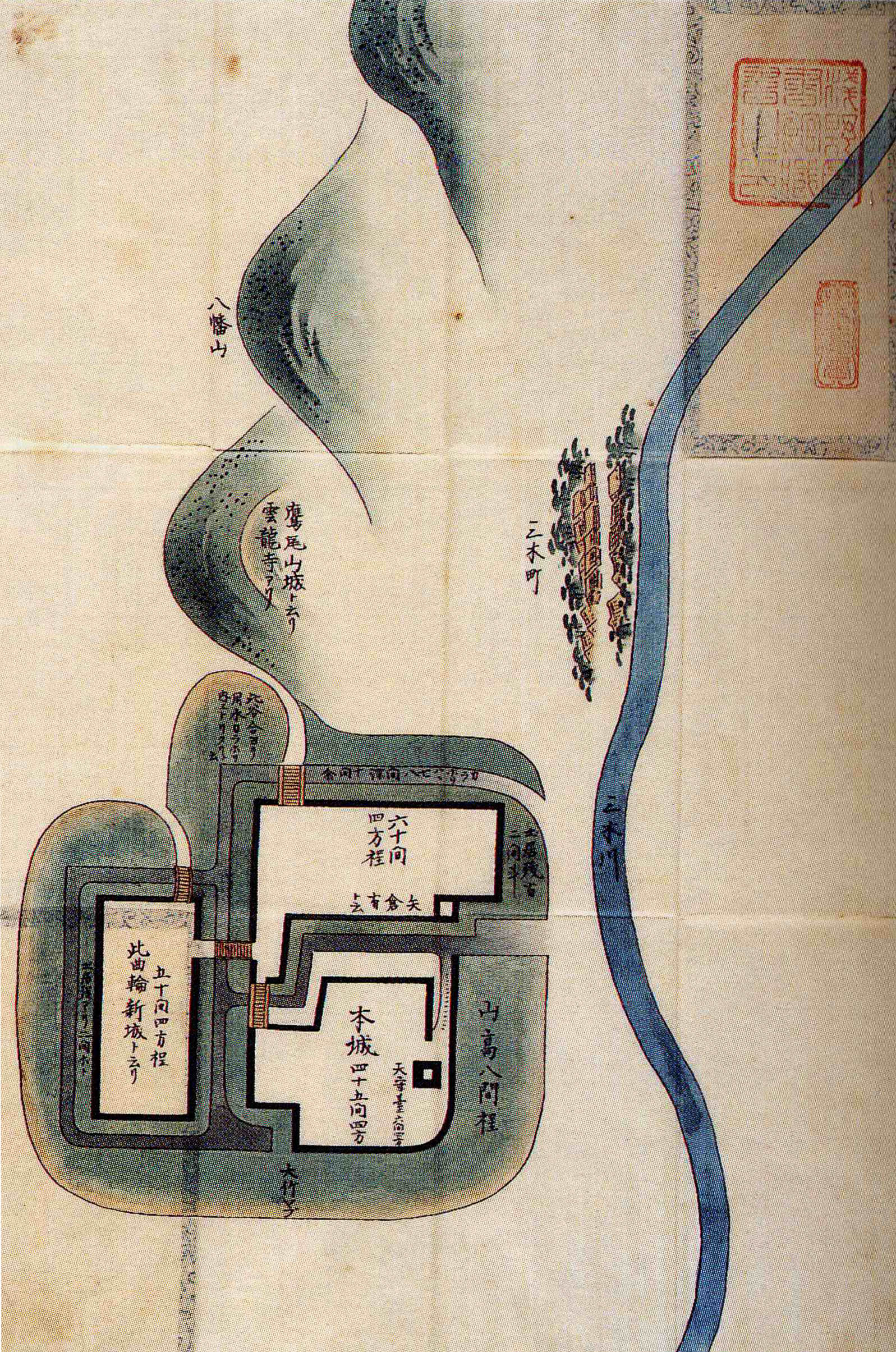 諸国古城之図播磨三木城